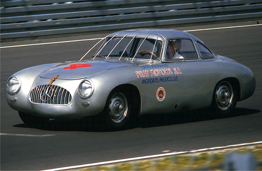 Mercedes-Benz 300 SL von 1952, gefahren von Baronin Ewy Korff-Rosquist. Markantes Kennzeichen: Die Gitterstäbe vor der Frontscheibe, montiert nach einem Geier-Crash in Mexiko.